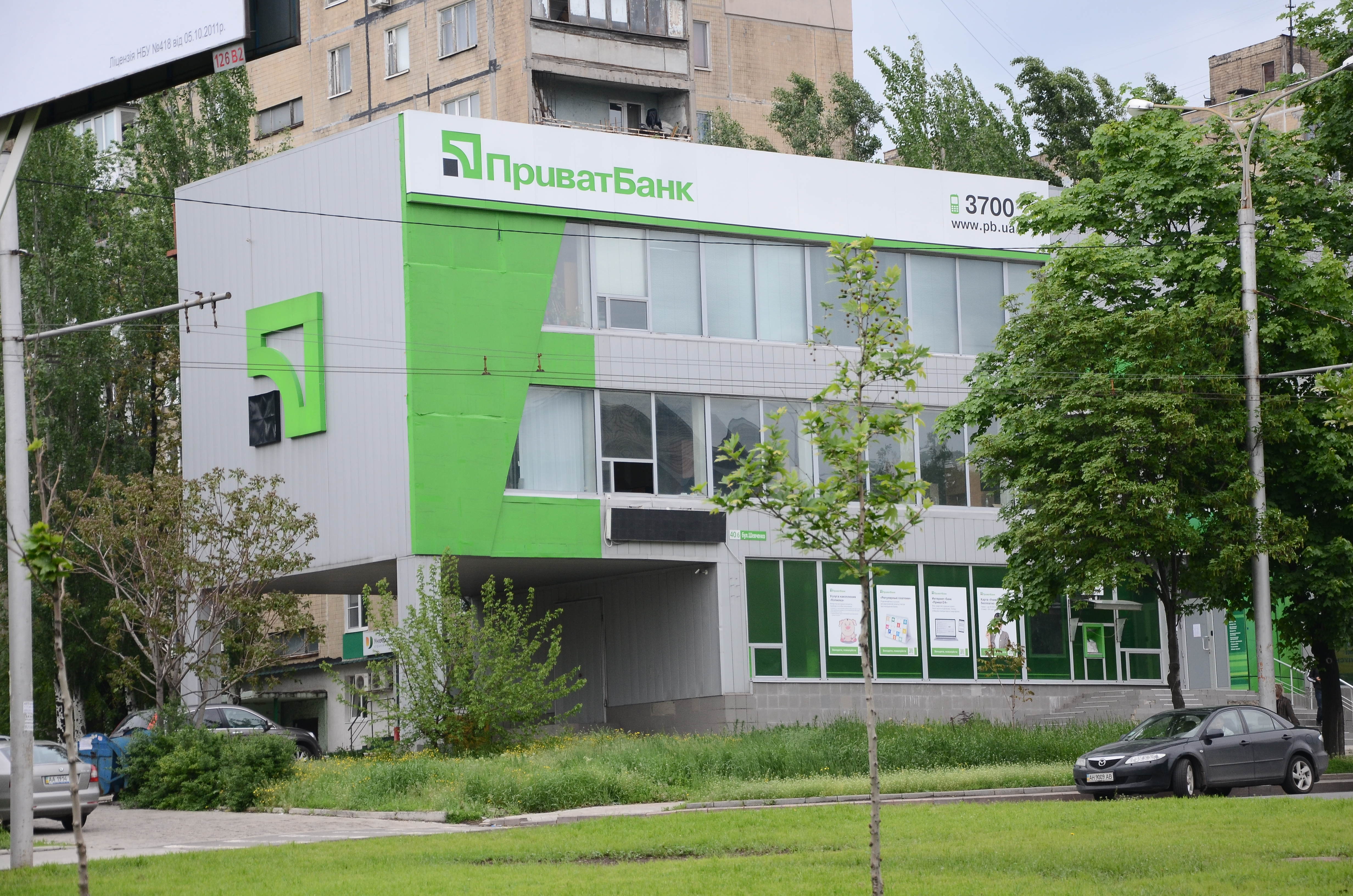 Донецк